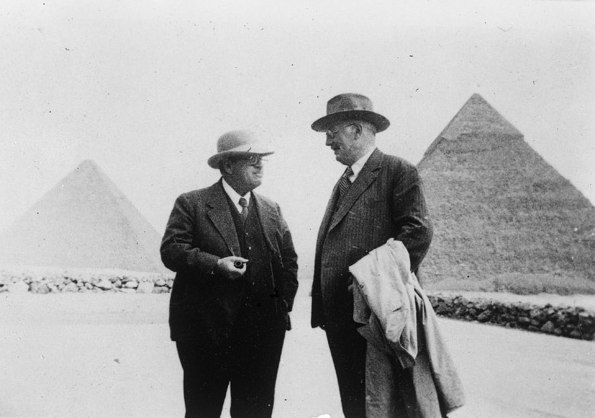 George Andrew Reisner (à gauche) et Georg Steindorff (à droite) devant les pyramides de Khéops et de Khéphren à Gizeh, en 1935.